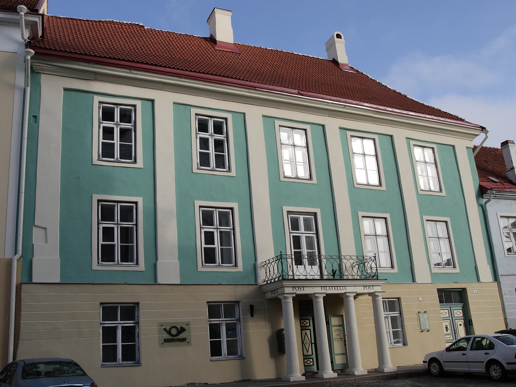 Tallinn, elamu Lossi plats 4, 17.-19.saj